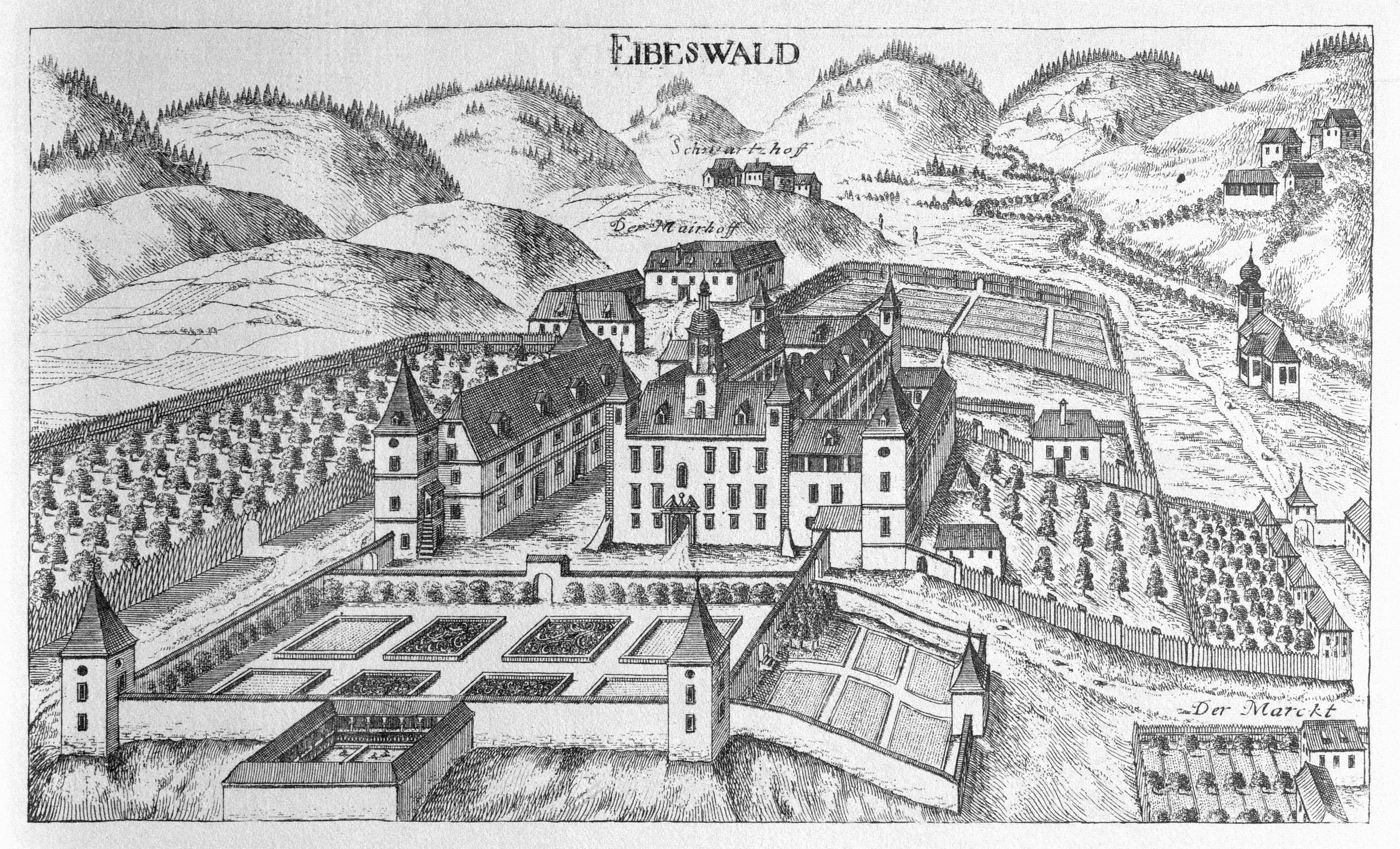 G. M. Vischers Käyserlichen Geographi, Topographia Ducatus Stiriae, Das ist: Eigentliche Delineation / und Abbildung aller Städte / Schlösser / Marcktfleck / Lustgärten / Probsteyen / Stiffter / Clöster und Kirchen / so es sich im Herzogthumb Steyrmarck befinden; Und anjetzo Umb einen billichen Preyß zu finden seynd Bey Johann Bitsch Universitäts Buchhandlern / Auff dem Juden=Platz bey der guldenen Saulen. Graz 1681 Die Nummerierung der Dateien folgt der alphabetischen Reihung der Orte